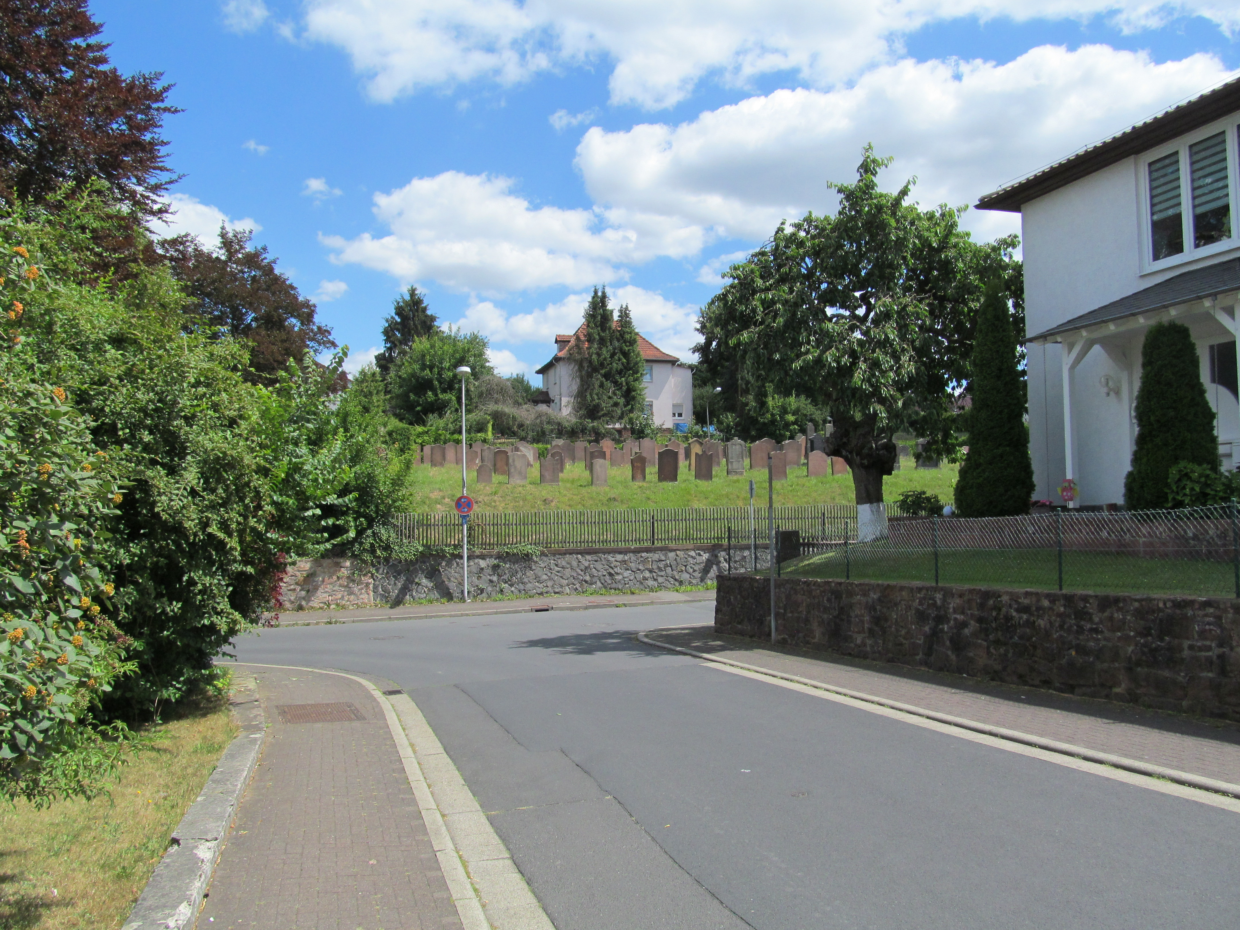 der jüdische Friedhof von Treysa zwischen der Stephanstraße vorn und der Wasenberger Straße hinten